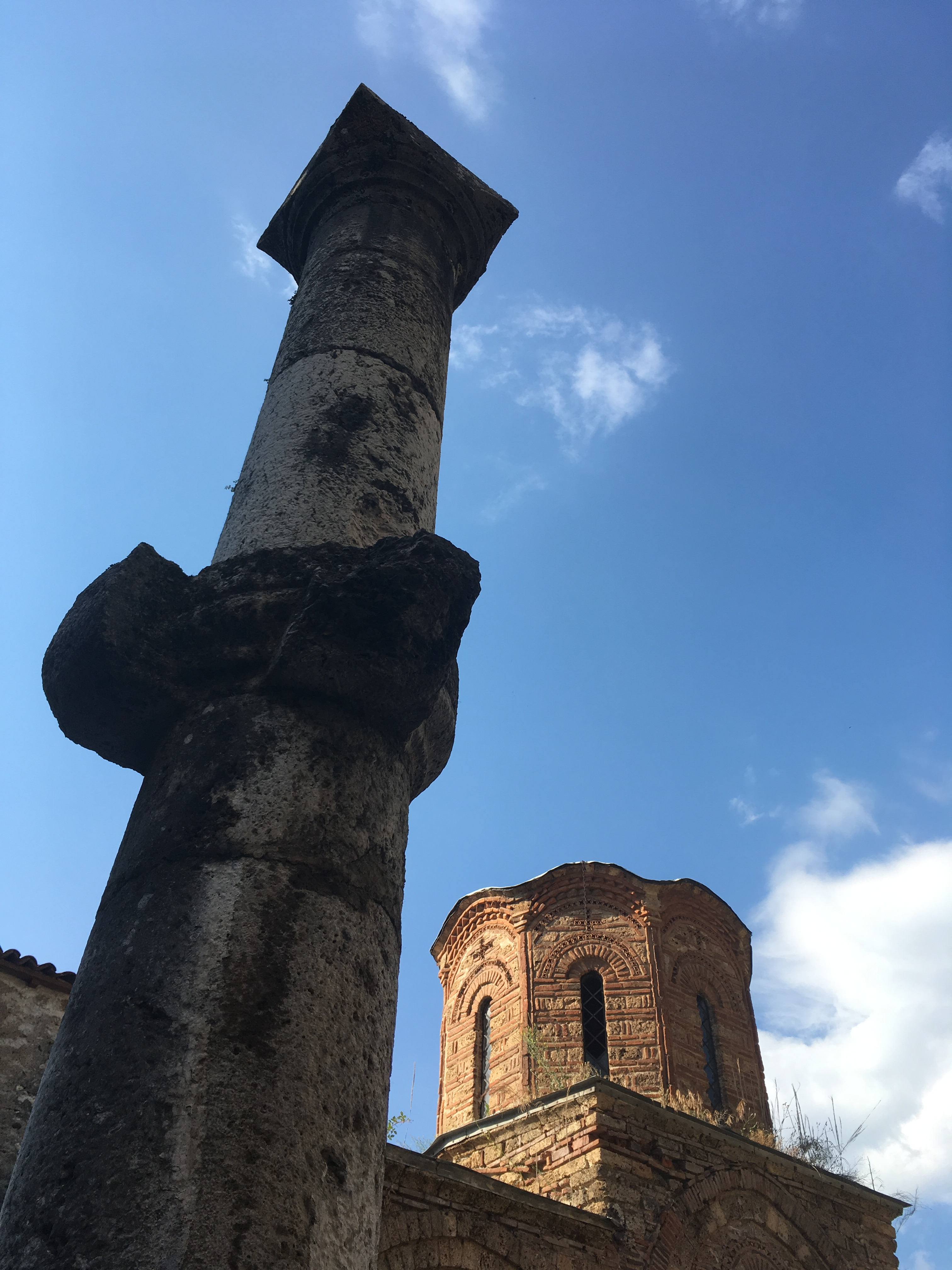 Средновековна црква во Призрен.